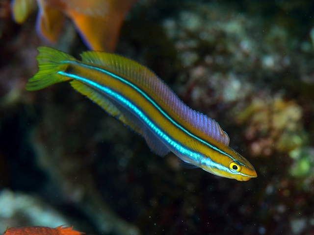 ミナミギンポ Plagiotremus rhinorhynchos